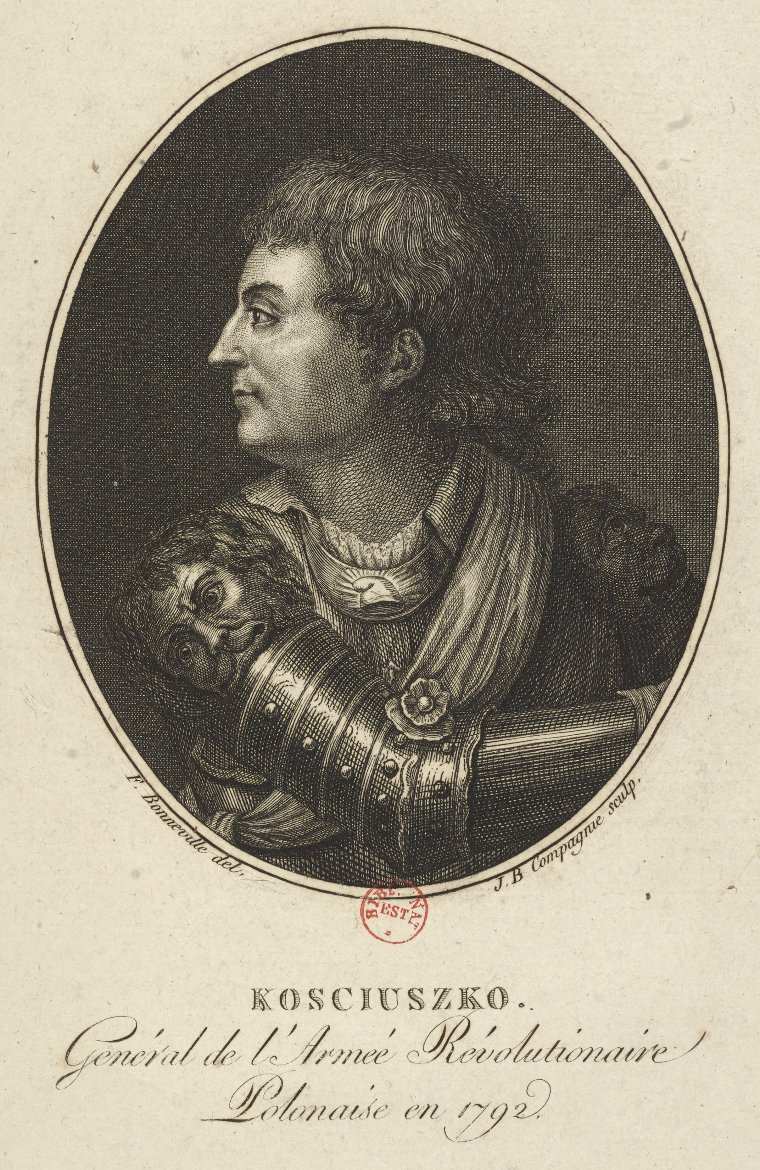 Tadeusz Kościuszko w 1792 roku